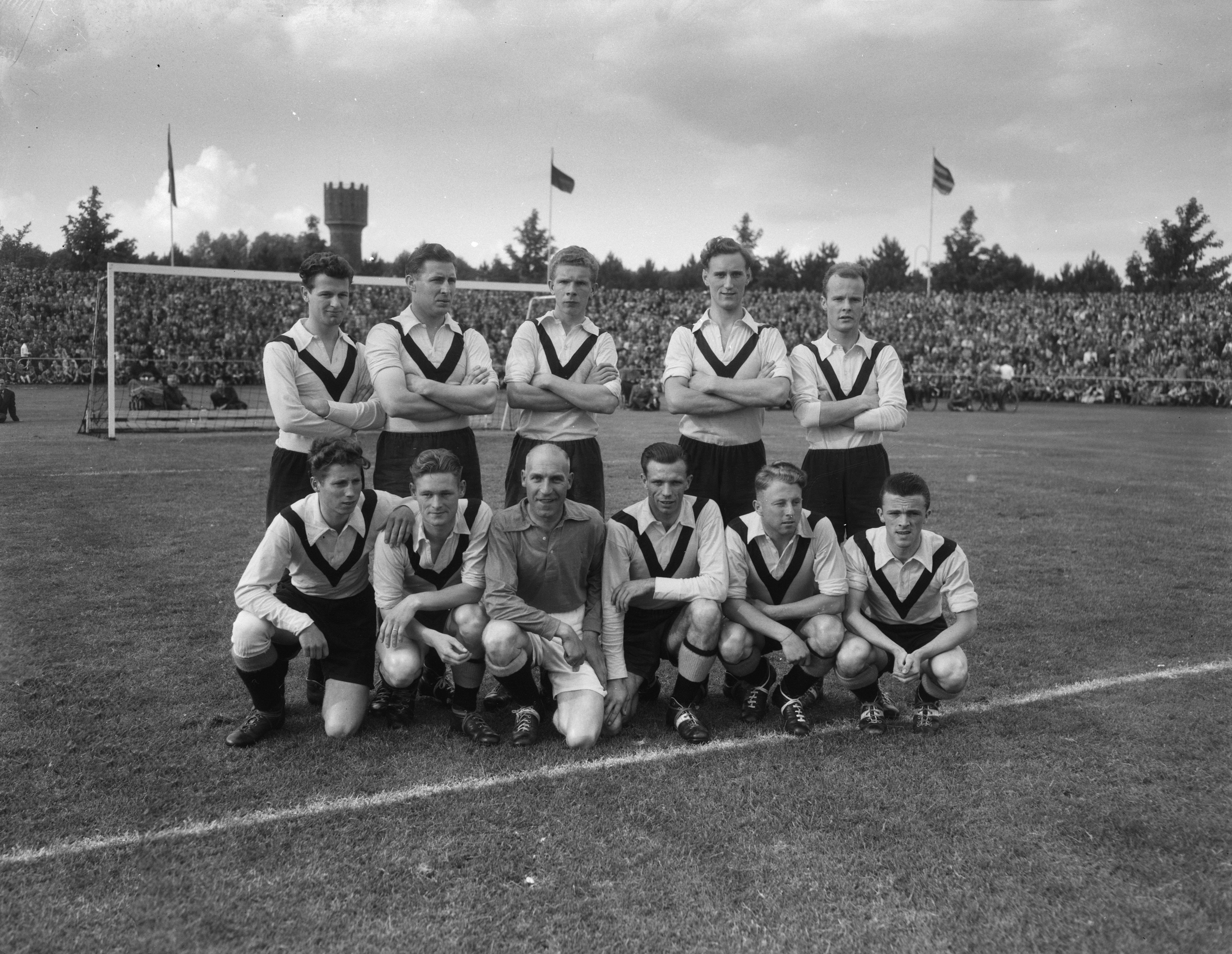 Collectie / Archief : Fotocollectie Anefo Reportage / Serie : [ onbekend ] Beschrijving : DOS elftal Datum : 27 juni 1954 Trefwoorden : ELFTALLEN Fotograaf : Duinen, […] van / Anefo Auteursrechthebbende : Nationaal Archief Materiaalsoort : Negatief (zwart/wit) Nummer archiefinventaris : bekijk toegang 2.24.01.04 Bestanddeelnummer : 906-5523